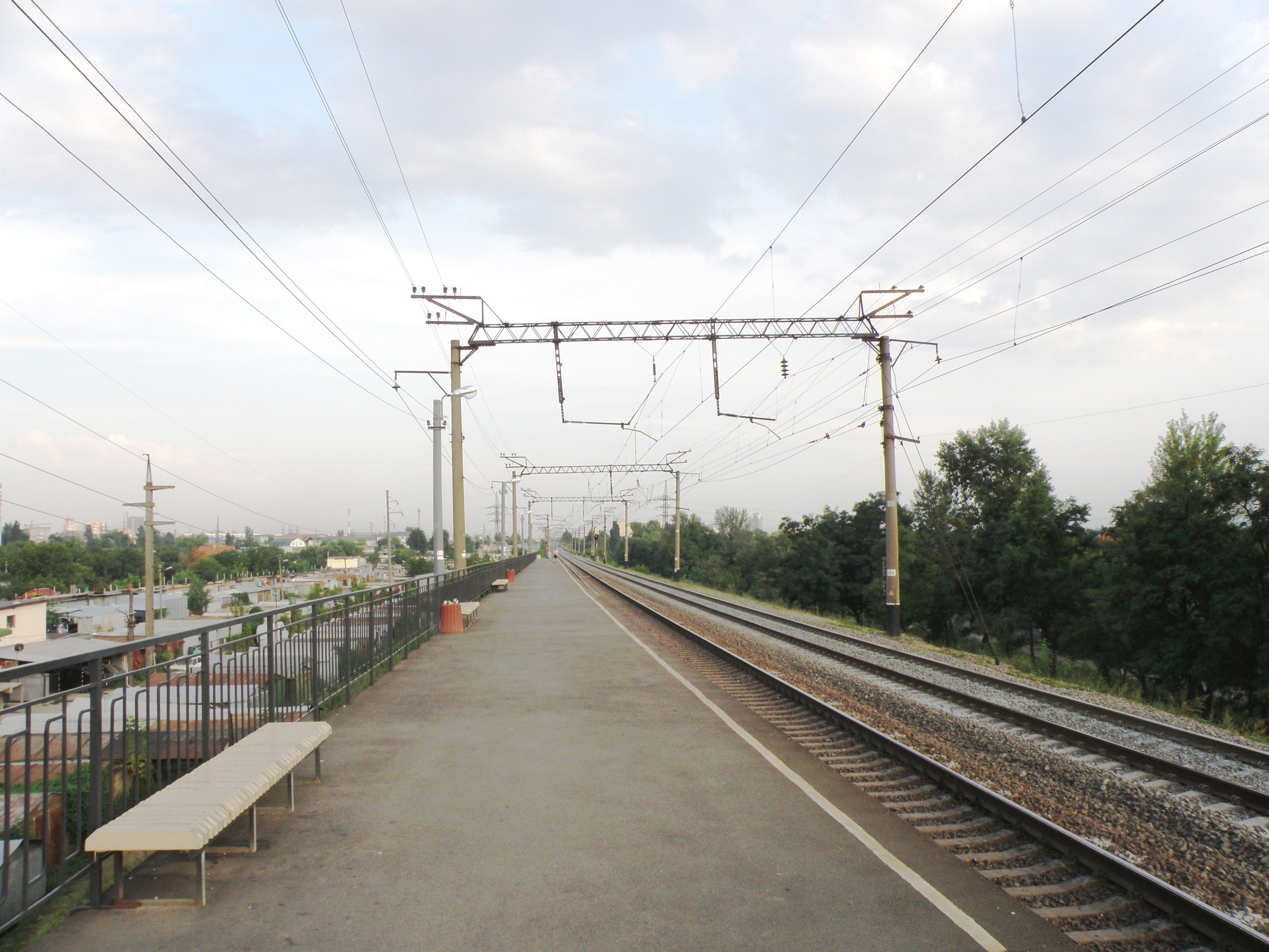 Київ. Залізнична платформа "Троєщина"